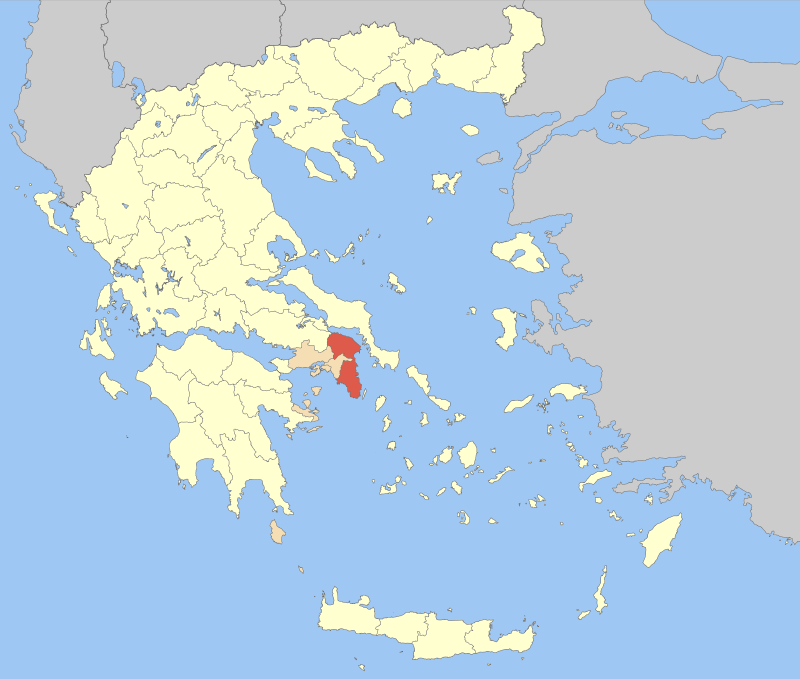 Locator map of East Attica prefecture (Νομαρχία Ανατολικής Αττικής) in Greece